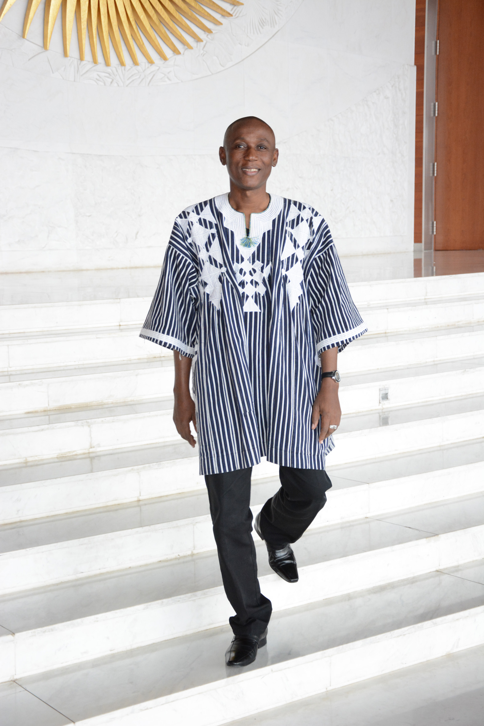 Jean-Baptiste Natama qui quitte l'Union Africaine